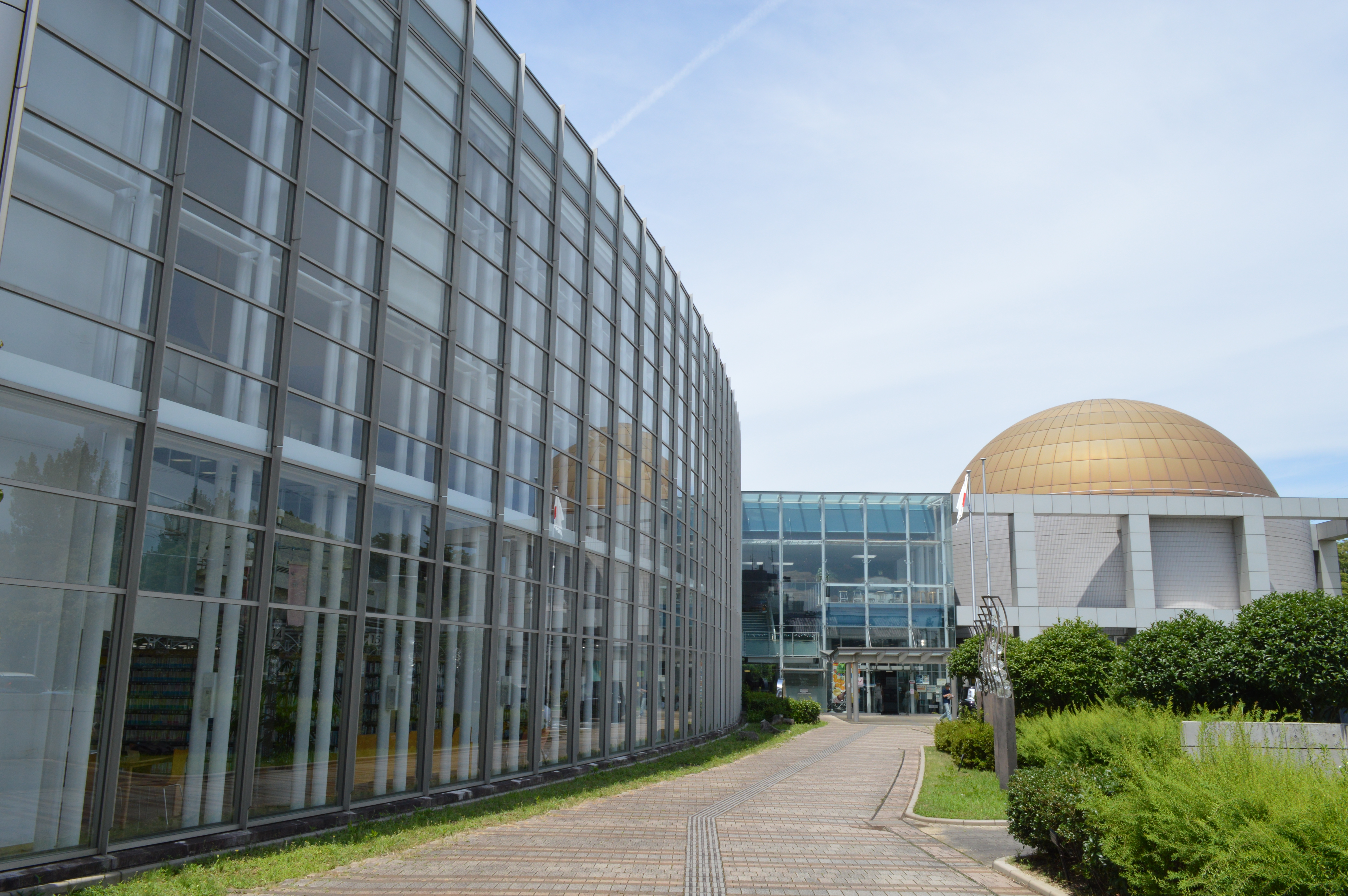 愛知県豊川市にある豊川市中央図書館。